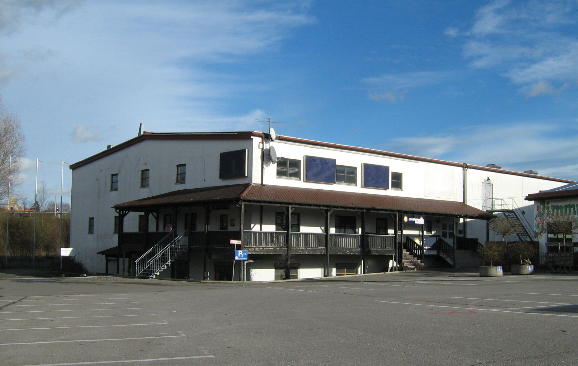 Ehemalige Diskothek Supermäx in Dasing. Am 28. August 1993 erschoss die Diskomafia die 16-jährige Christine G. auf der Veranda der damaligen Discothek "SuperMäx" in Dasing. Die Arzthelferin aus Esting wurde aus 80 Meter Entfernung in die Lunge getroffen. Ihr Mörder Muthana S. schoss mit Michael Sch.s Jagdgewehr von der nahen Bundesstraße 300 vom stehenden Auto aus auf sie.